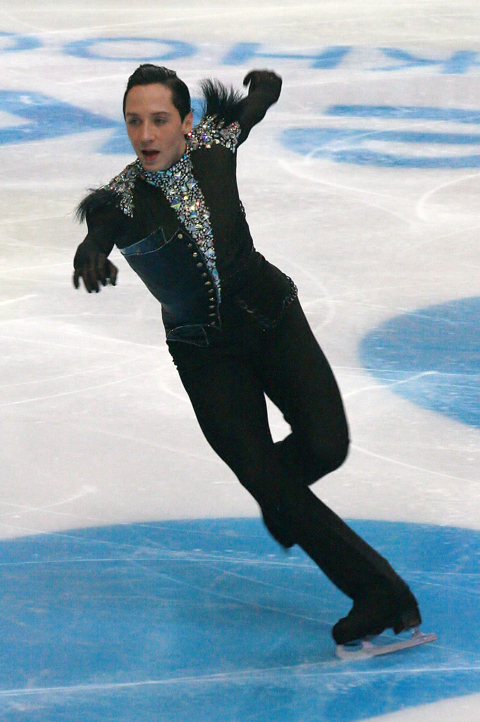 Джонни Вейер на Кубке Ростелекома 2012. Короткая программа.